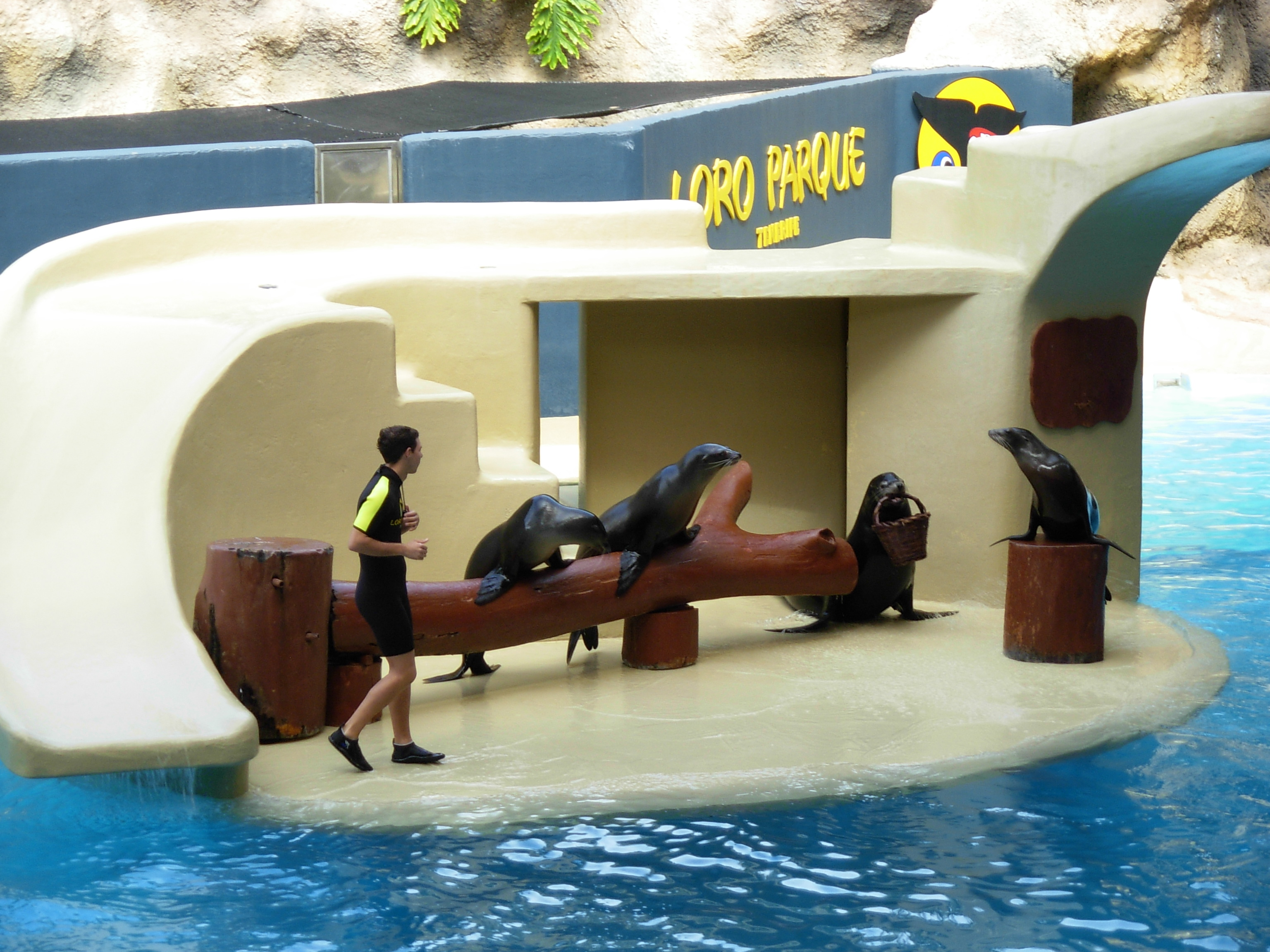 Sea lions at Loro Parque.